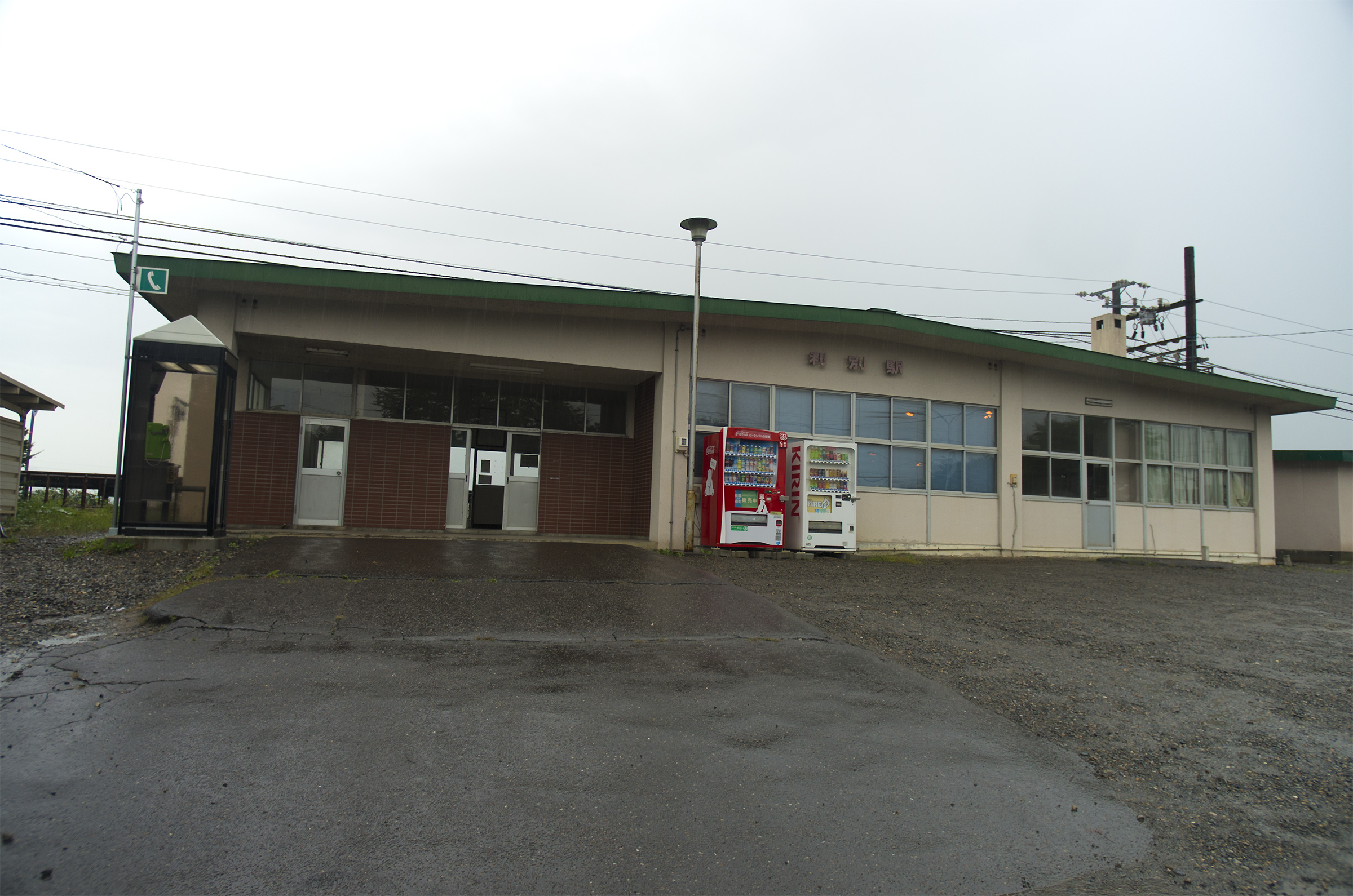 北海道旅客鉄道根室本線利別駅駅舎